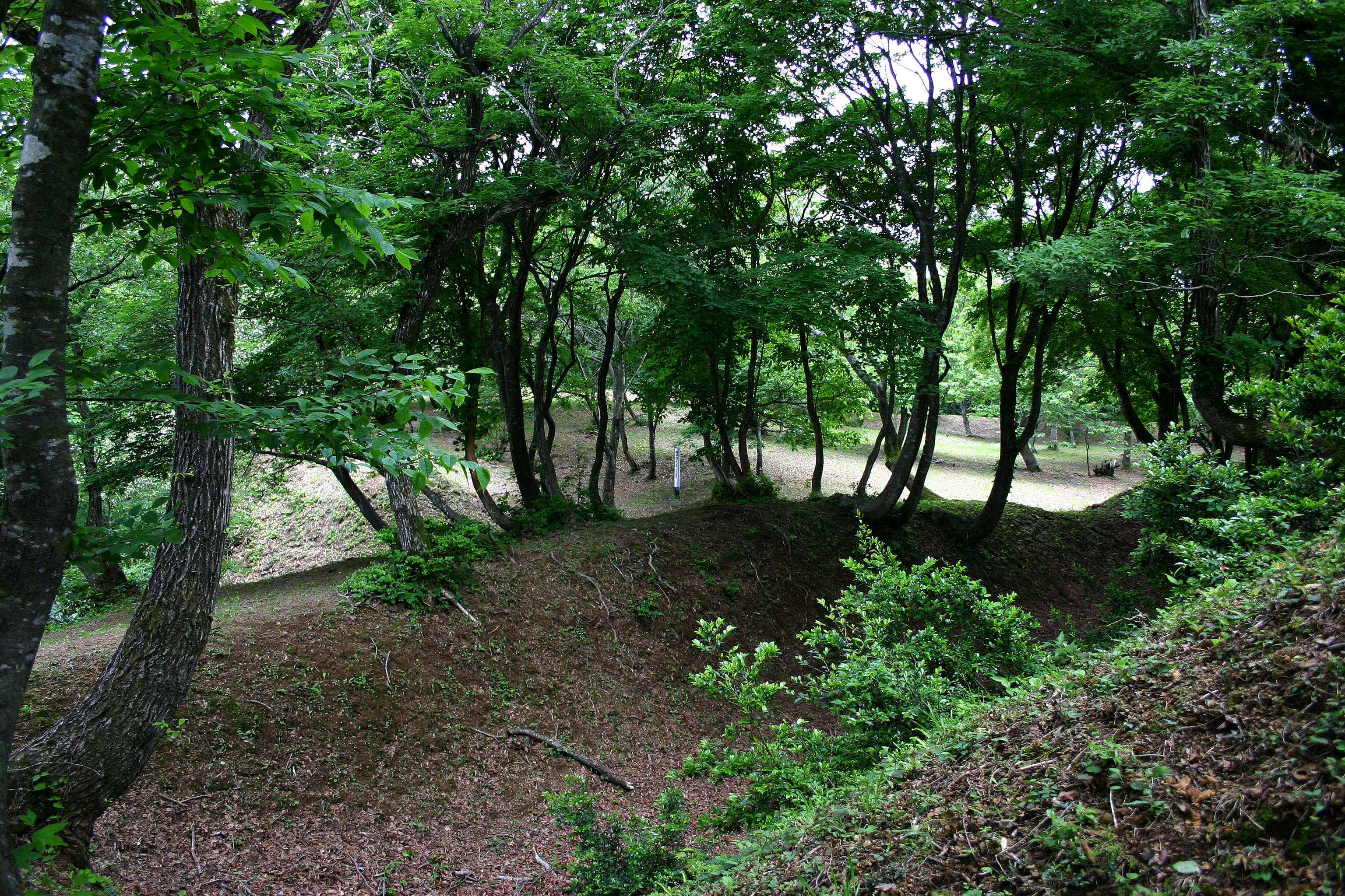 福井県と滋賀の県境にある山城。賤ヶ岳の戦いにおいて柴田勝家の本陣が置かれたと言われる。